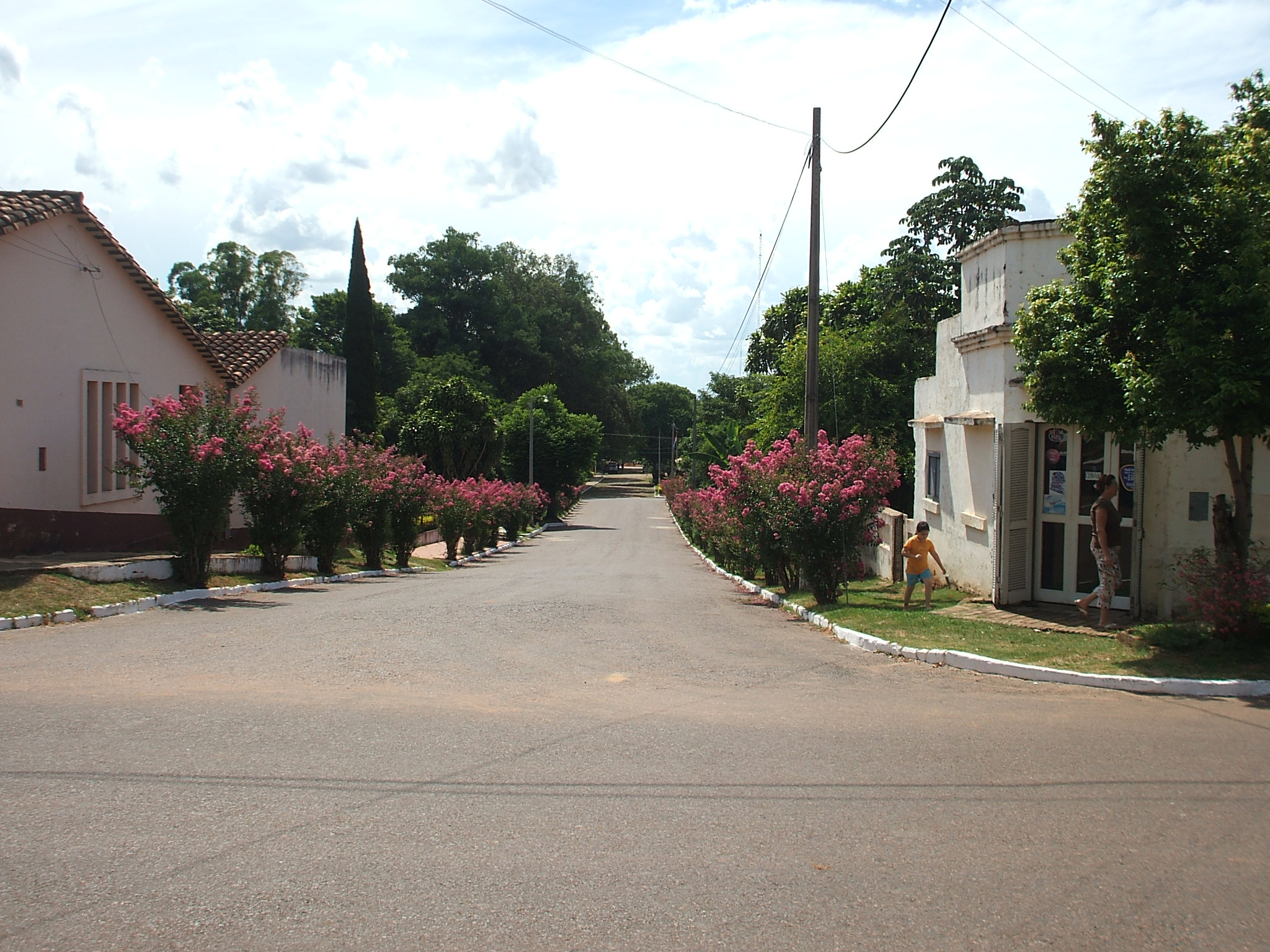 Calle de Atyra